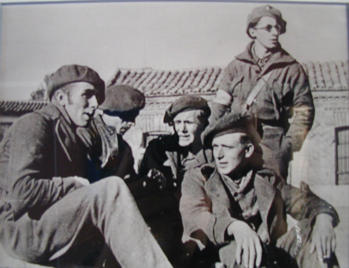 Adolphe Low (stehend) mit Interbrigadisten des Edgar-Andre-Bataillons